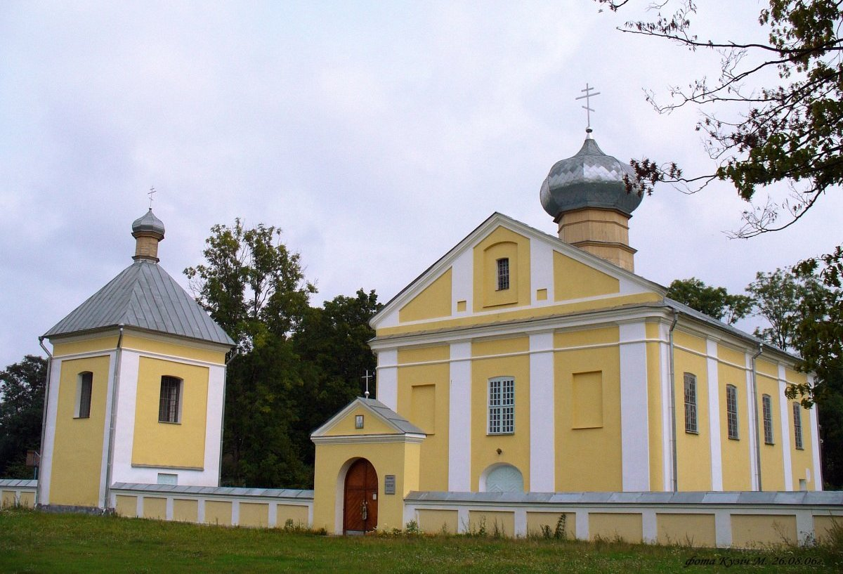 Шэбрын. Свята-Прачысценская царква